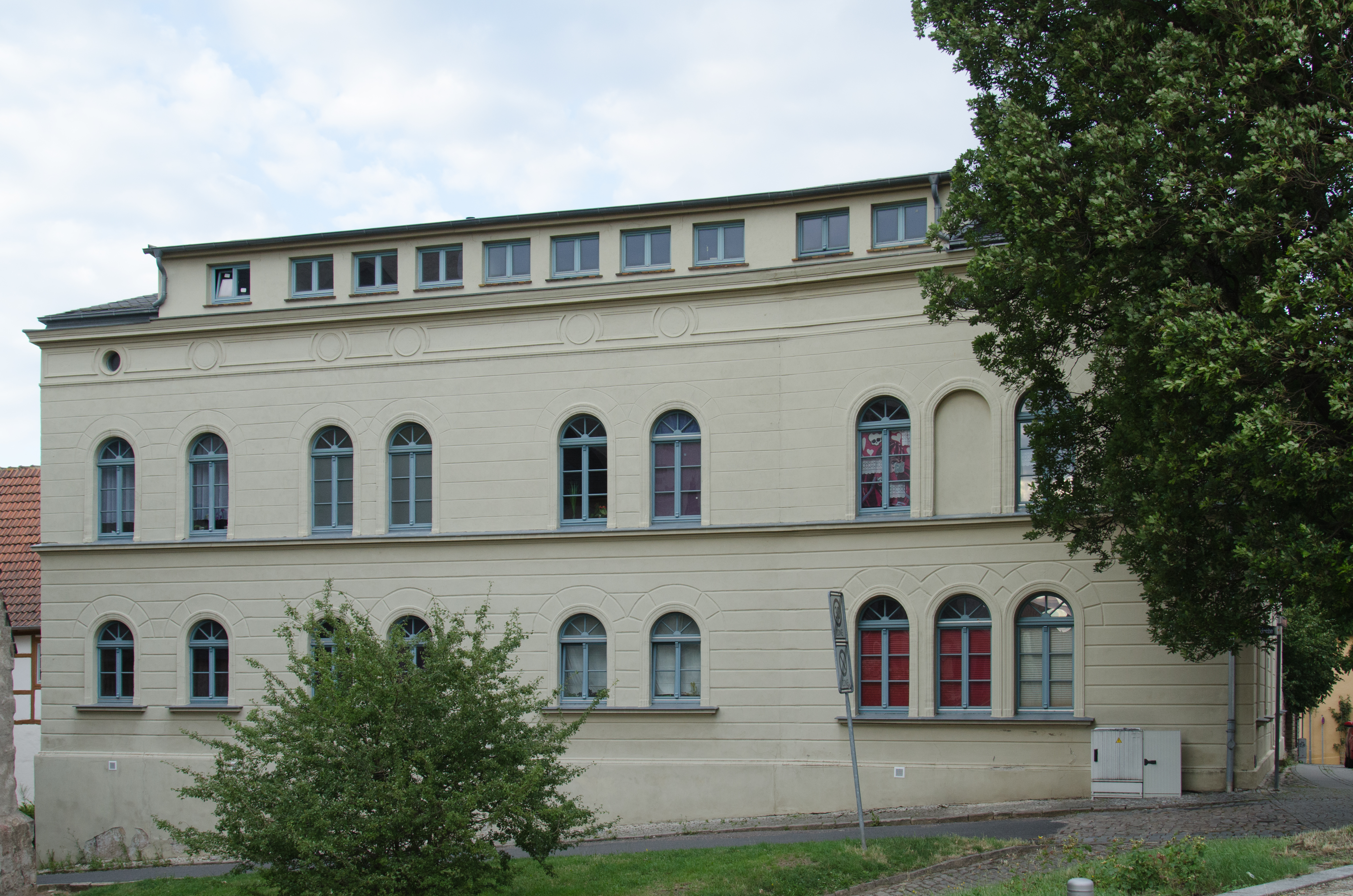 Sangerhausen, Riestedter Straße 1a